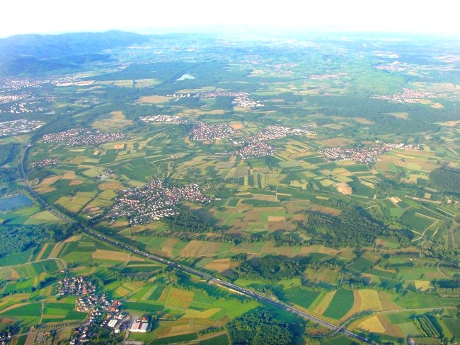 Luftbild vom Breisgau aufgenommen bei einer Ballonfahrt.